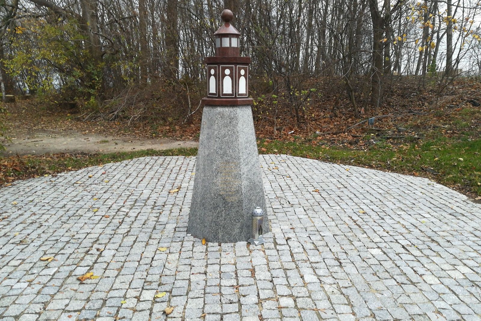 Cmentarz Marynarki Wojennej. Replika latarni morskiej funkcjonującej na oksywskim klifie w latach 1887-1933.